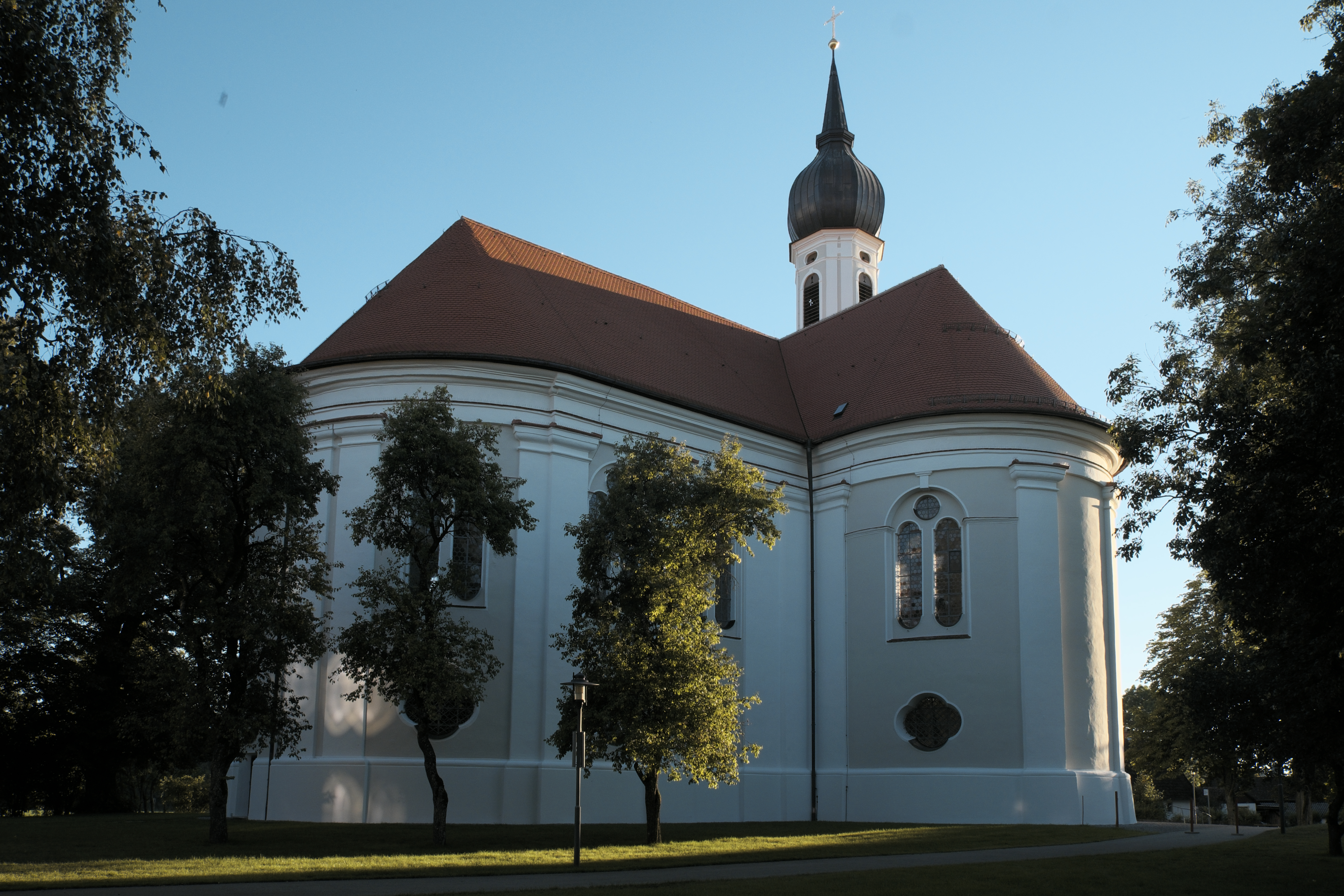 Katholische Wallfahrtskirche Zur Schmerzhaften Muttergottes in Vilgertshofen im Landkreis Landsberg am Lech (Bayern/Deutschland)